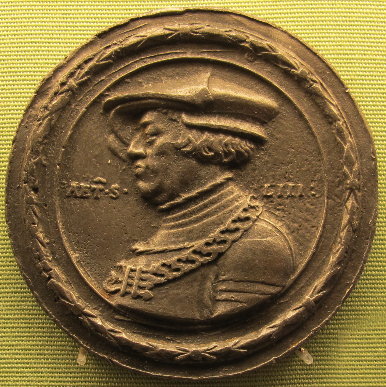 Caspar Wintzerer, 1526